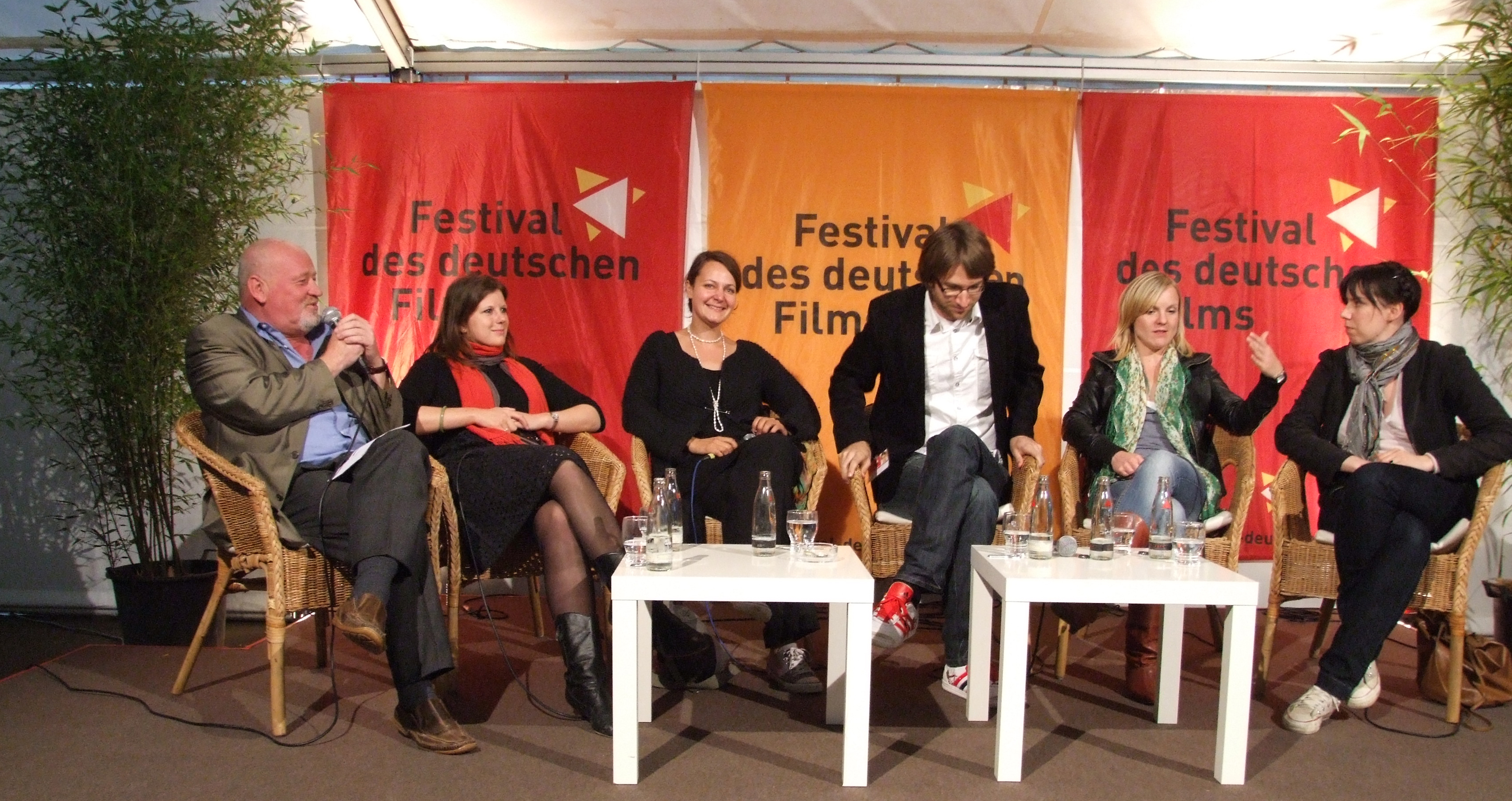 Festival des Deutschen Films. Filmgespräch zum Film "Das Zimmer im Spiegel" von Rudi Gaul im Strandzelt auf der Parkinsel in Ludwigshafen. 3. von links: Eva Wittenzellner, Darstellerin der Judith, 4. v.L: Rudi Gaul, Regisseur, 5. v.L. Kirstin Fischer, Darstellerin der Luisa